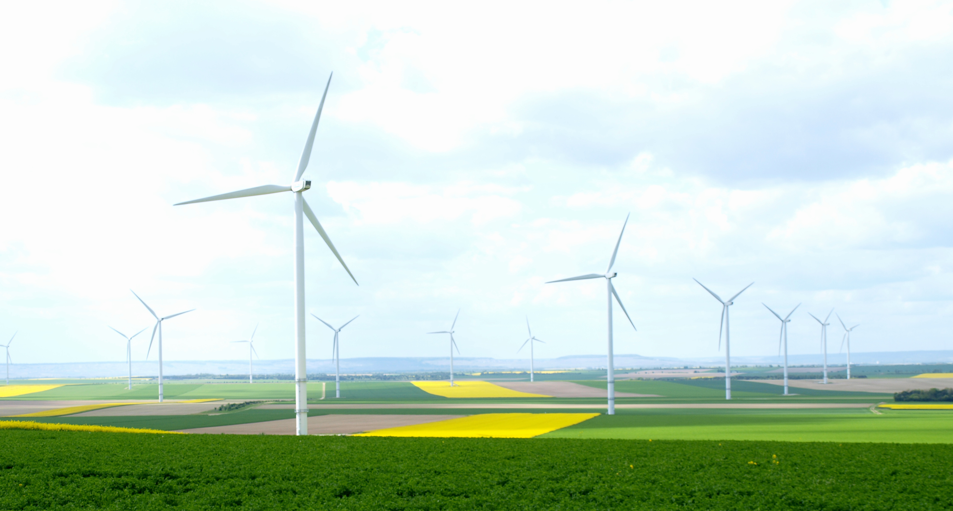 Germinon (Marne, France) ; le parc éolien.